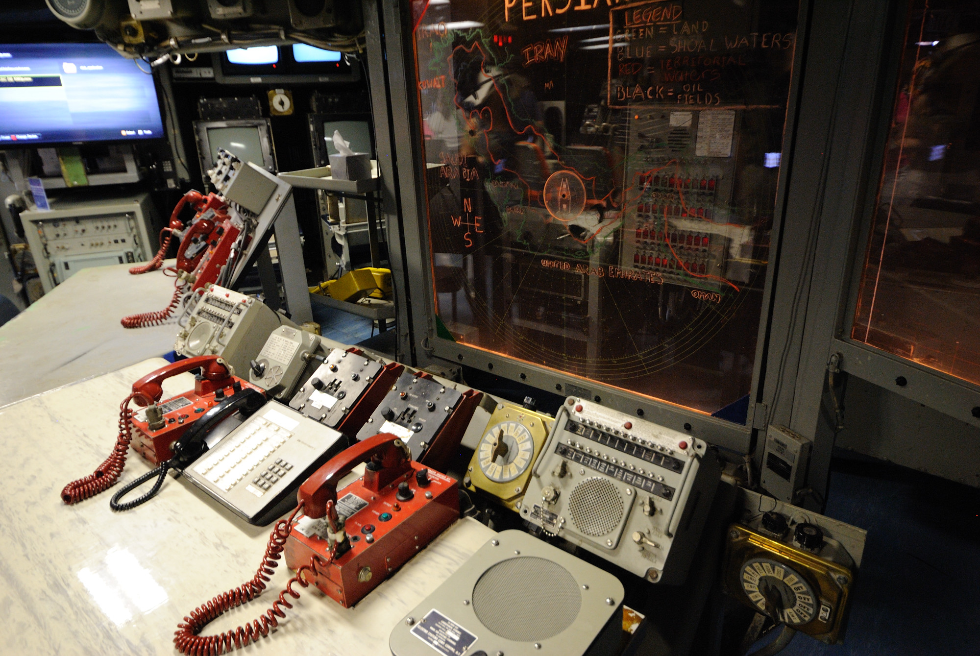 USS Missouri - Combat Engagement Center